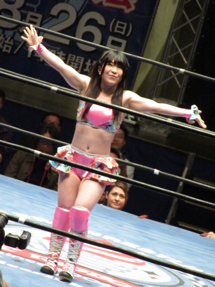 2018.3.25後楽園ホールにて